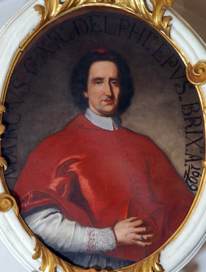 Bambini N. (1710-1712), Ritratto del Cardinale Daniele Marco Dolfin (Delfino)